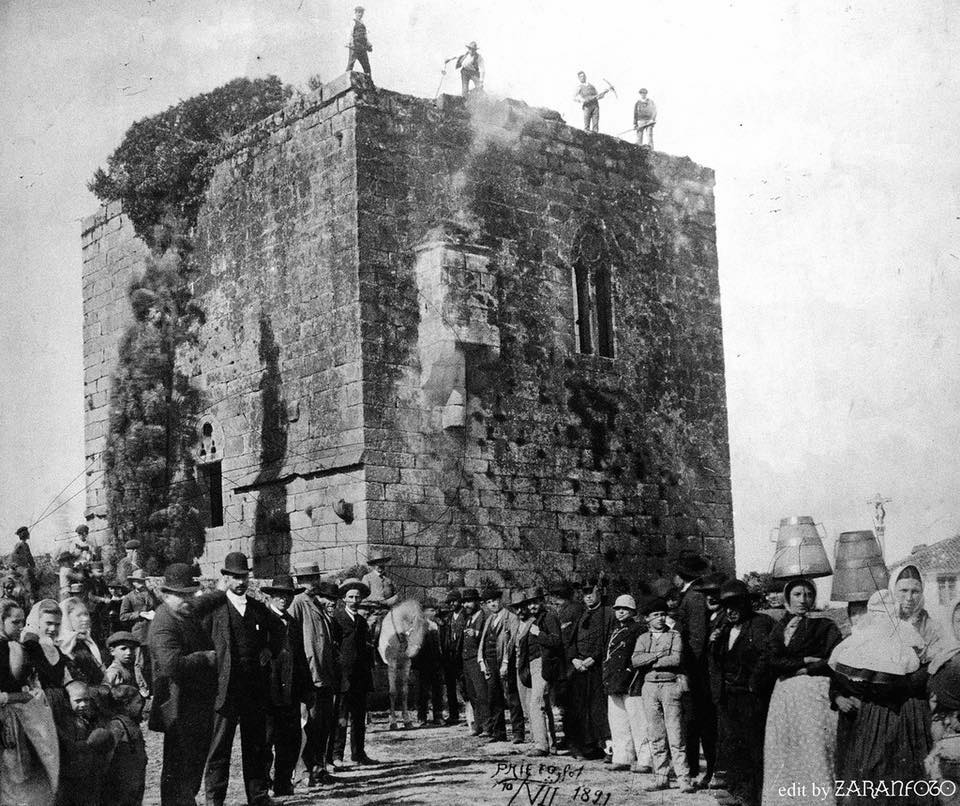 Escaneada de fotografía antigua y editada por ZARANFOTO